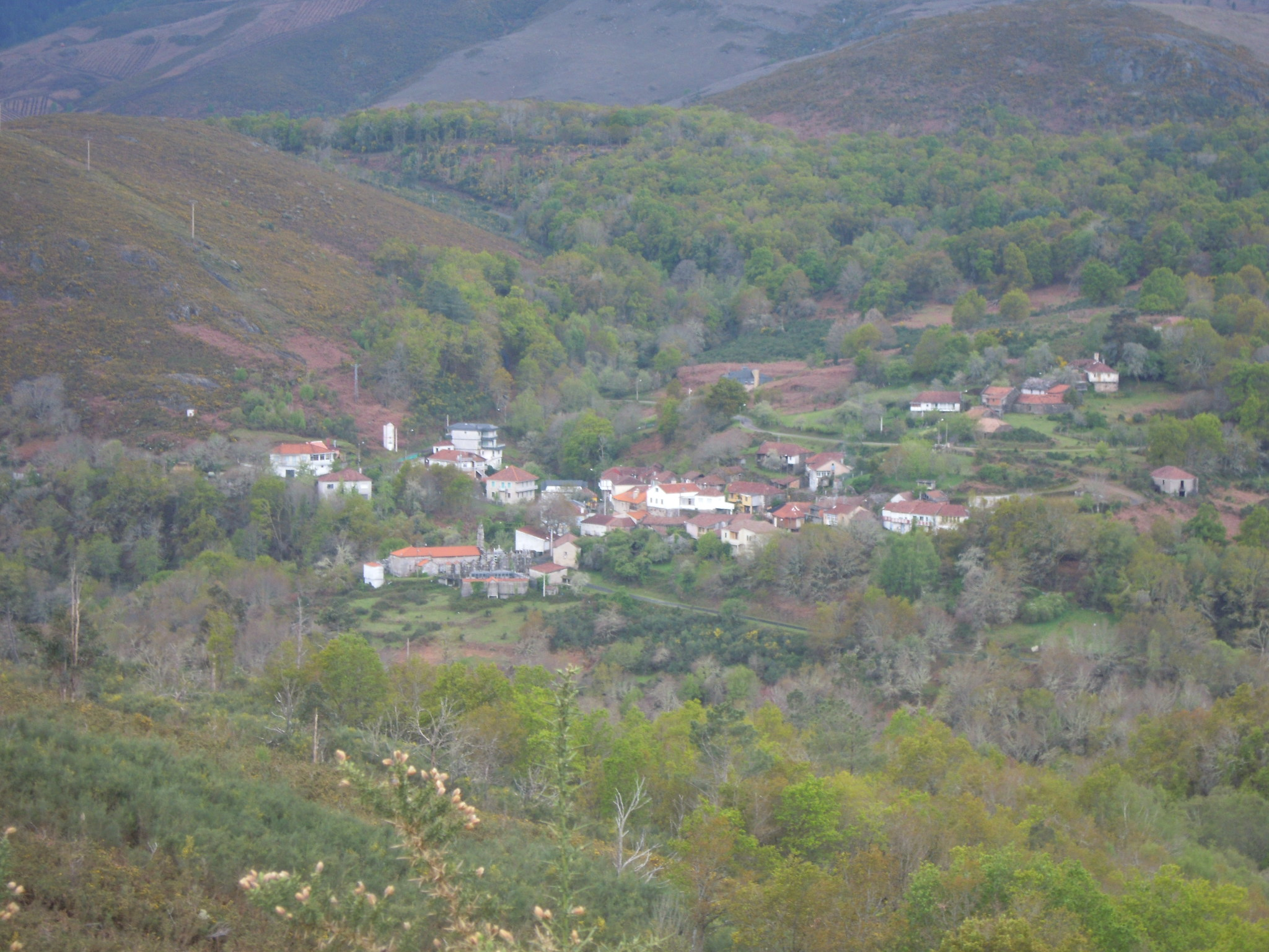 Vista xeral da aldea de Couso, Couso, Avión).